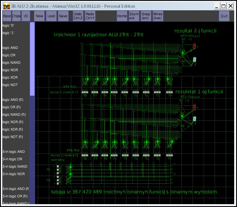 Снимок модели бинарного (двухоперандного, двухтритного) с бинарным (двухразрядным, двухтритным) АЛУ в трёхбитной одноединичной системе троичных логических элементов в логическом симуляторе Atanua.